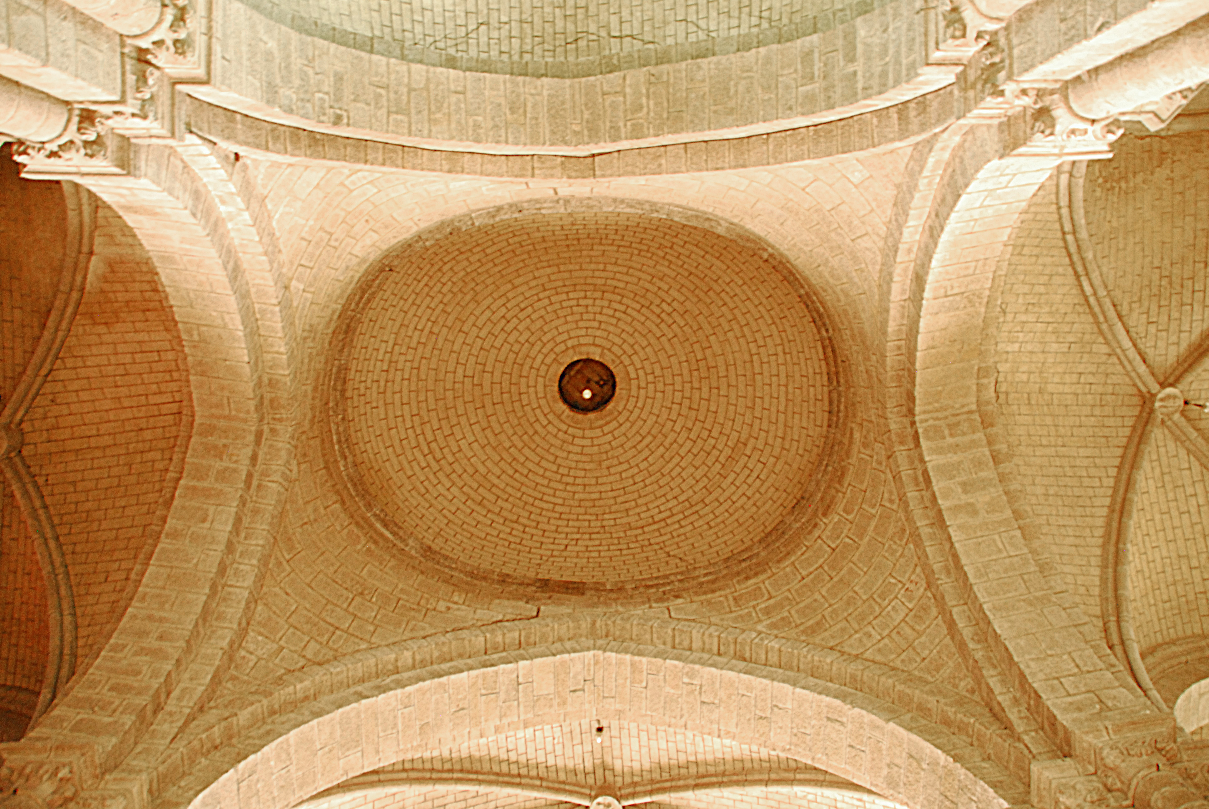 N.-D. de La Souterraine, Pendentifkuppel der Vierung